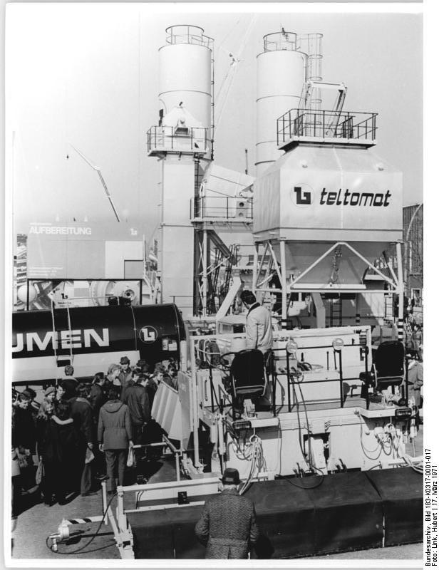 Leipzig, Frühjahrsmesse, Freigelände Zentralbild Link 17.3.71- Leipziger Frühjahrsmesse 1971- Ein Beispiel wissenschaftlich-technischer Zusammenarbeit zwischen der UdSSR und der DDR zeigt der VEB Baumaschinen Gatersleben mit der Nivelliereinrichtung, die am Deckenfertiger SSF 5 (Vordergrund) angebracht ist. Der VEB Teltomat Teltow stellt einen 80-Tonnen-Fertiggutsilo vor, das in Industriekooperation von dem polnischen Werk Gazomet - Rawiz gefertigt wurde.